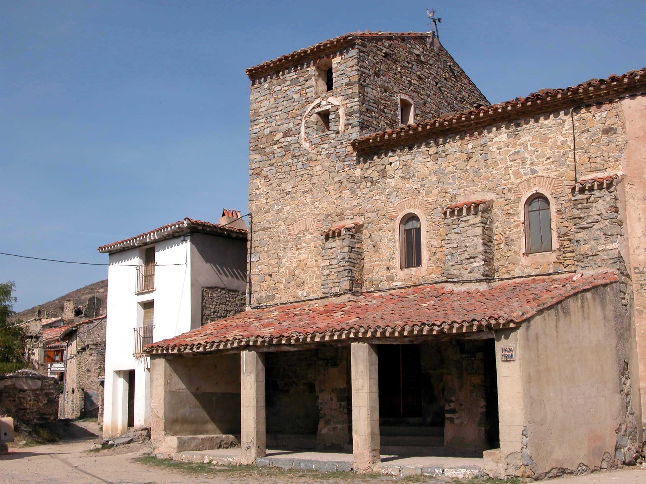 Ermita de Navalsaz, aldea de Enciso, La Rioja - España.